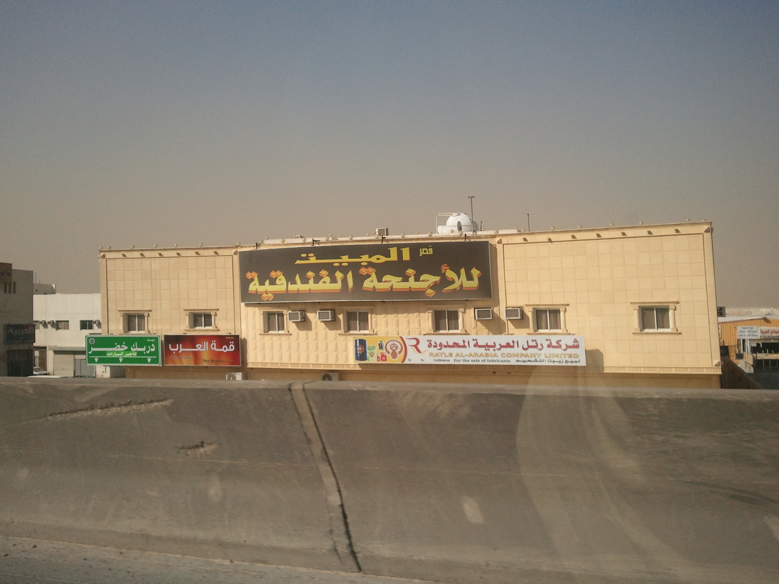 Al Khaleej, Riyadh Saudi Arabia